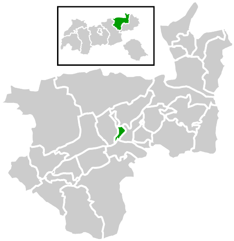 Lage der Gemeinde innerhalb des Bezirks Kufstein